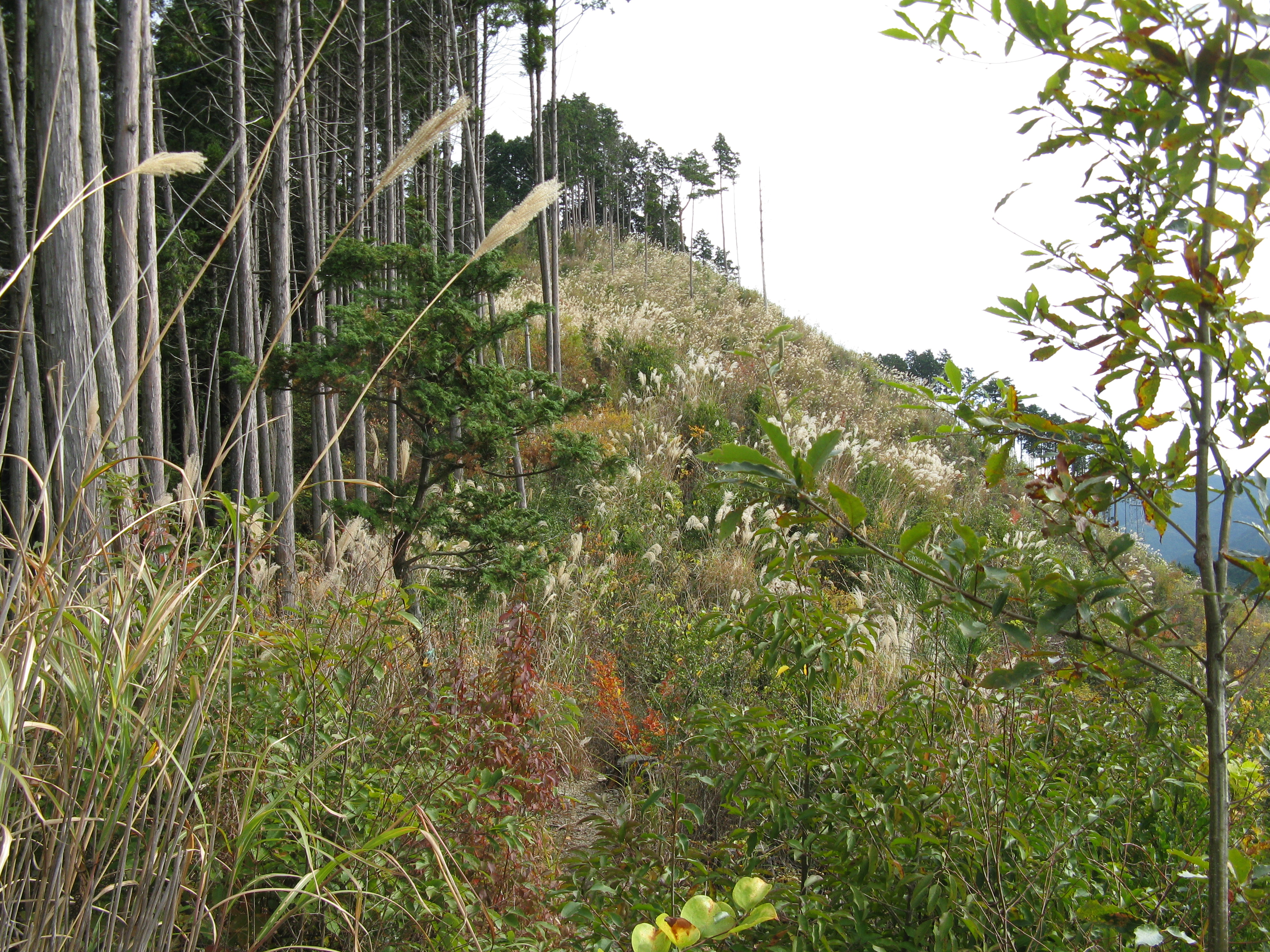 府庁山 山頂（三叉路）付近